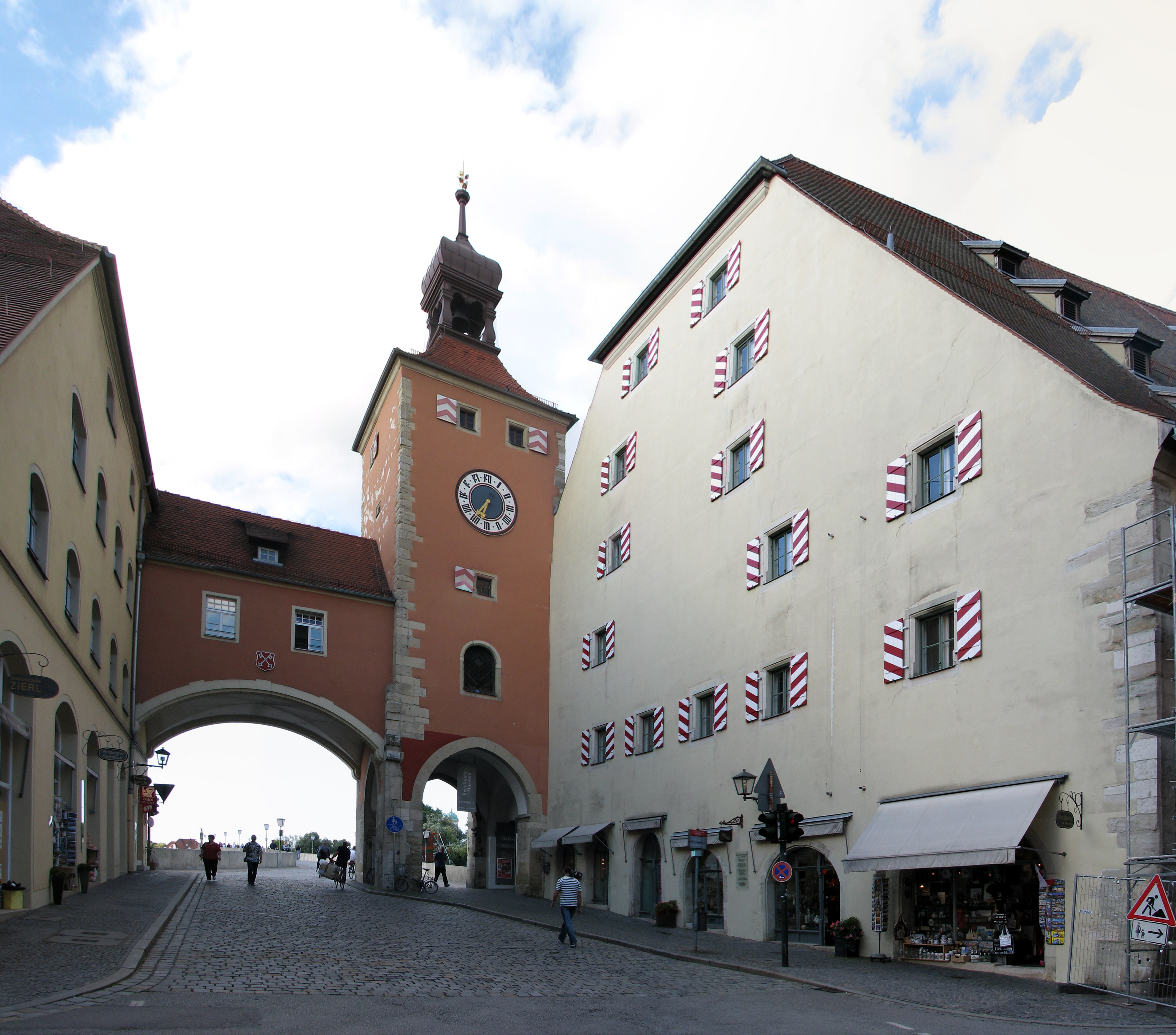 Brücktor (links) und historischer Salzstadel (rechts) an der Steinernen Brücke in Regensburg